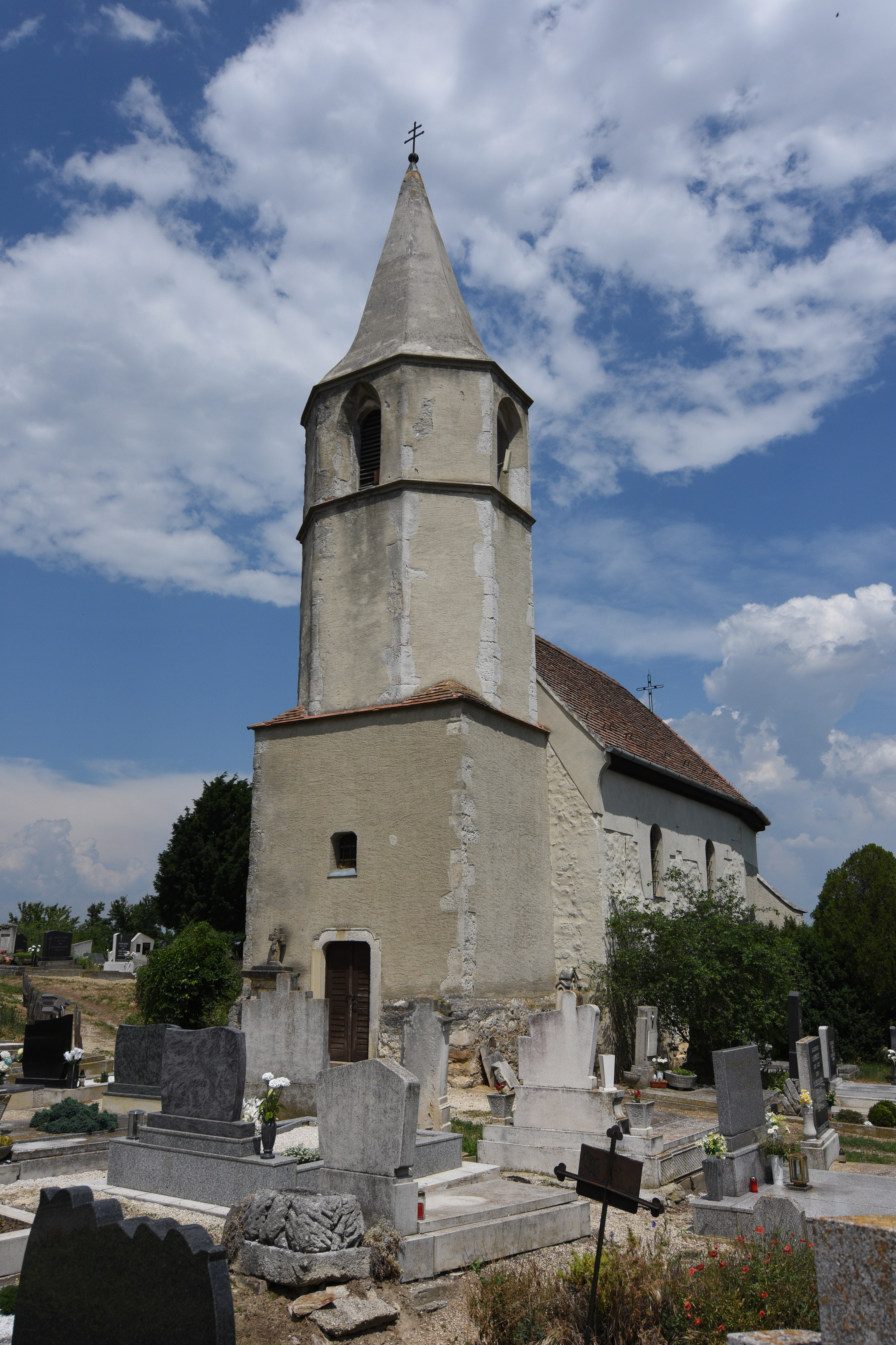 Saint Wolfgang Church Balf